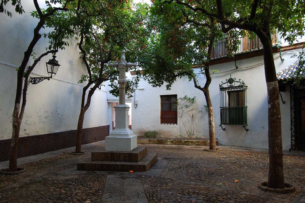 Plaza Santa Marta de Sevilla (Andalucía, España), situada detrás de la plaza Virgen de los Reyes